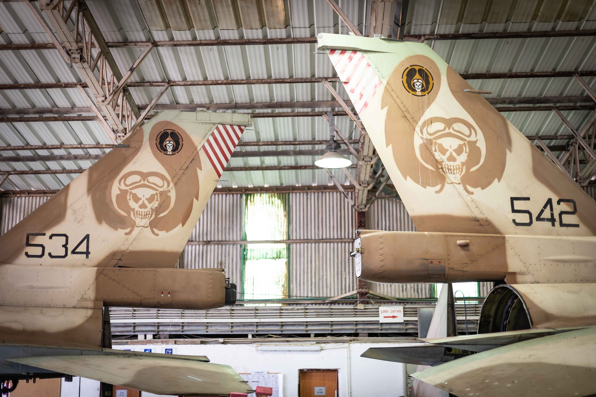 תיקון של יא"א 22 (יחידת האחזקה האווירית) למטוסי "ברק" (F-16 C/D) שניזוקו בהצפה בבסיס חצור בינואר 2020.